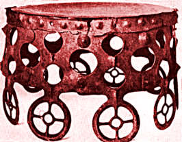 Balkåkratrommen.